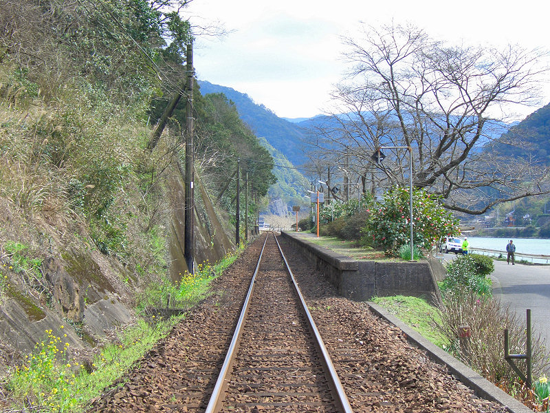 JR肥薩線葉木駅 ホーム 奥が人吉駅方面、手前が八代駅方面。 踏切内より撮影 撮影者/著者/著作権保有者 : MK Products (本人がアップロード) 撮影日 : 2007/03/07 葉木駅用にアップロードした画像です。良い画像があれば別の画像に変えてください。